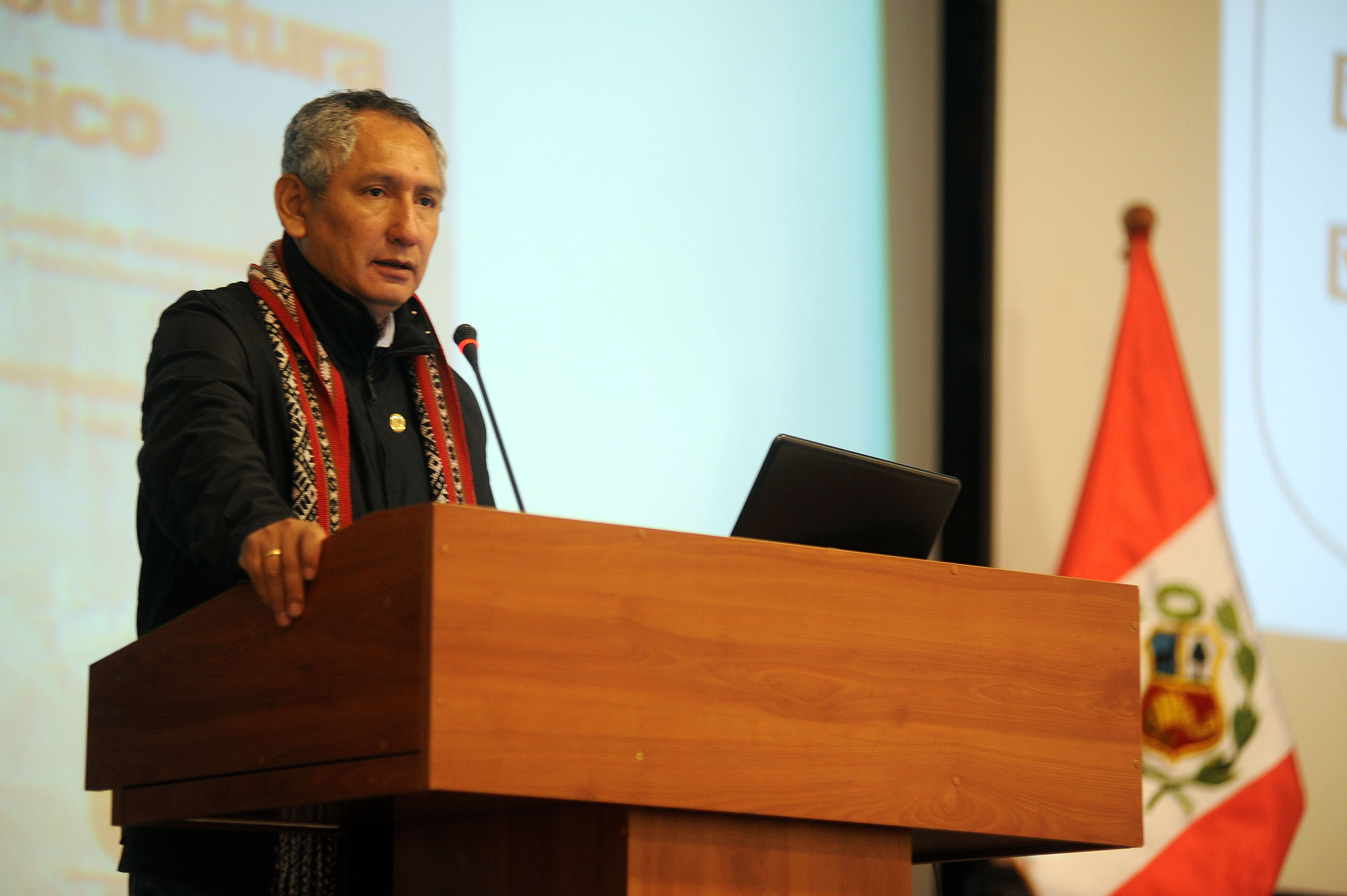 El Presidente de la Comisión de Vivienda, congresista Marco Falconi Picardo, inauguró la Segunda Audiencia Publica Descentralizada, en el Cusco, sobre Vivienda Rural, Acceso a los Programas de Vivienda e Infraestructura de de Saneamiento Básico.